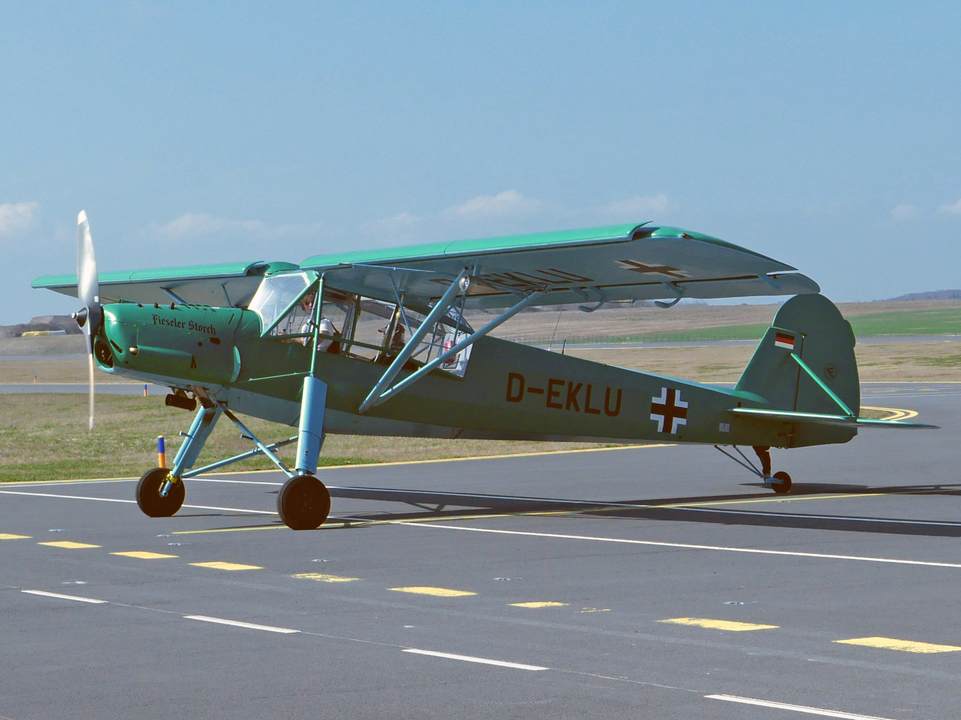 D-EKLU Flughafen Kassel April 2015. Der Fieseler Storch D-EKLU wurde 1943 in den Fieseler Werken in Kassel-Waldau mit der Werksnr. 110061 produziert.